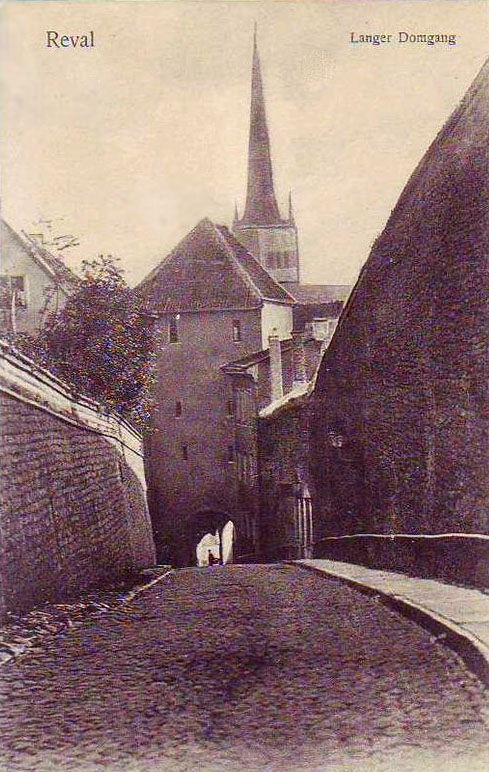 Reval: Langer Domgang